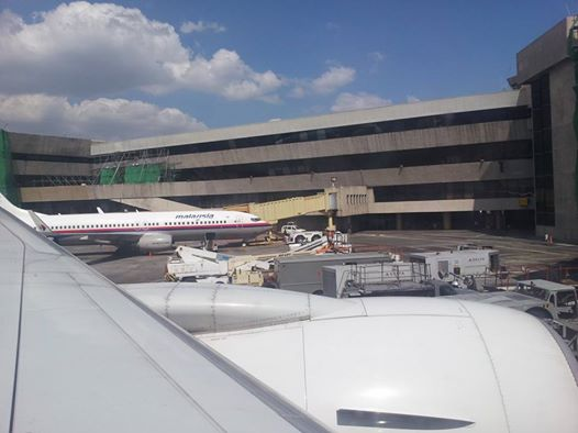 마닐라 공항(비행기 내부에서 찍은 사진).